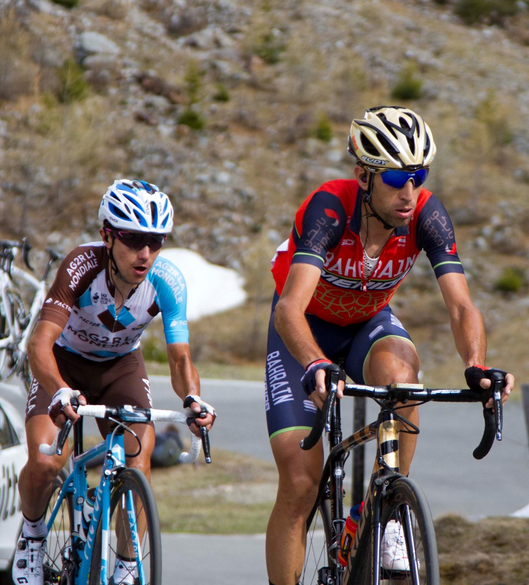 024 nibali pozzovivo